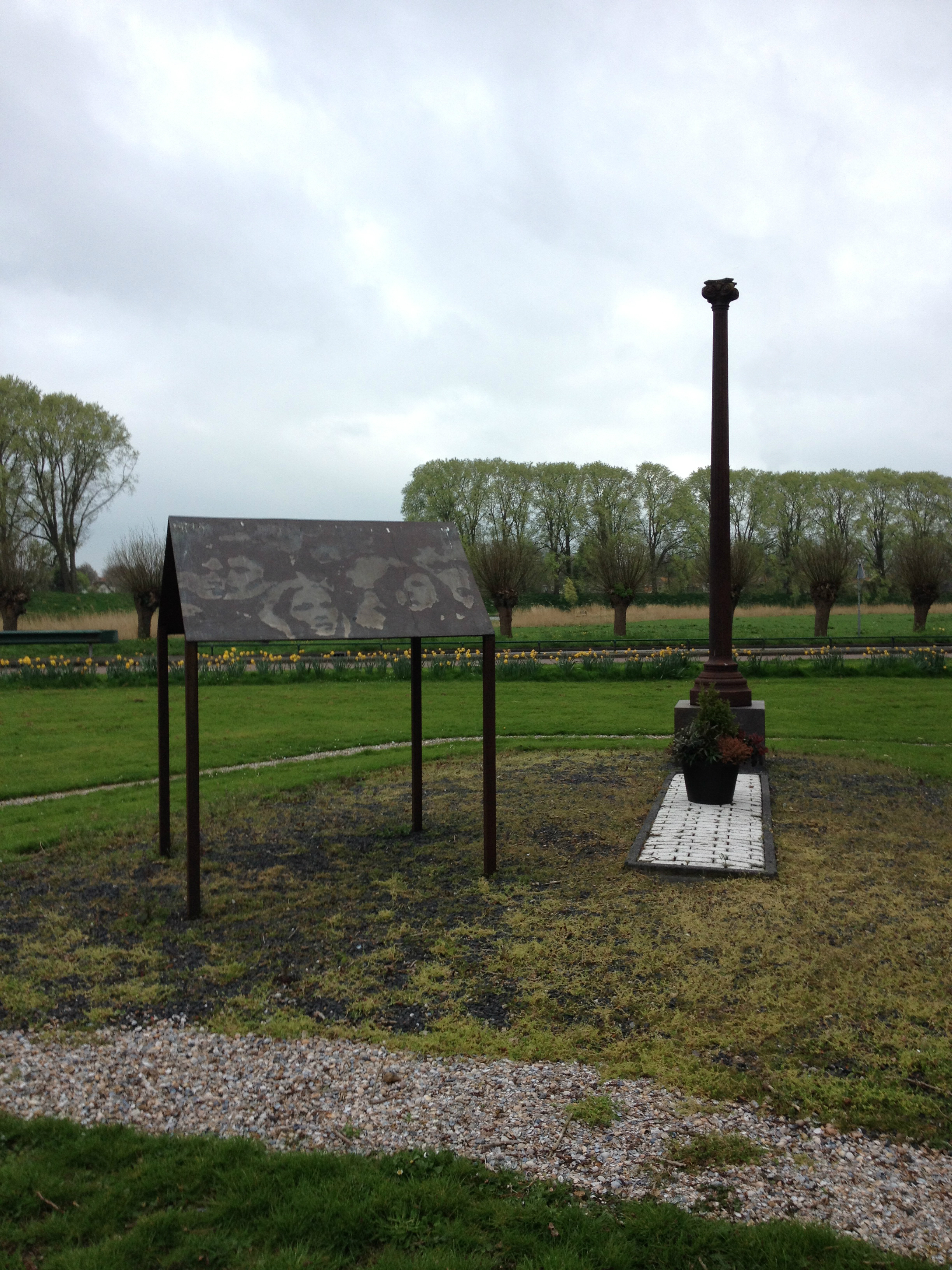 Oorlogsmonument aan de Nelson Mandeladreef te Enkhuizen, genaamd 'Schaduwcorrectie 1995'. Ontwerper: Joseph L.M. Neefjes (17-01-1949). Onthulling vond plaats op 4 mei 1995.